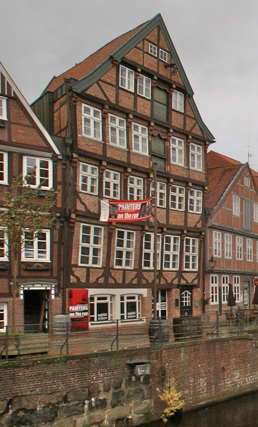 Kunsthaus Stade. (Ausschnitt aus: File:Stood - Haven un Fackwarkhueser.jpg )